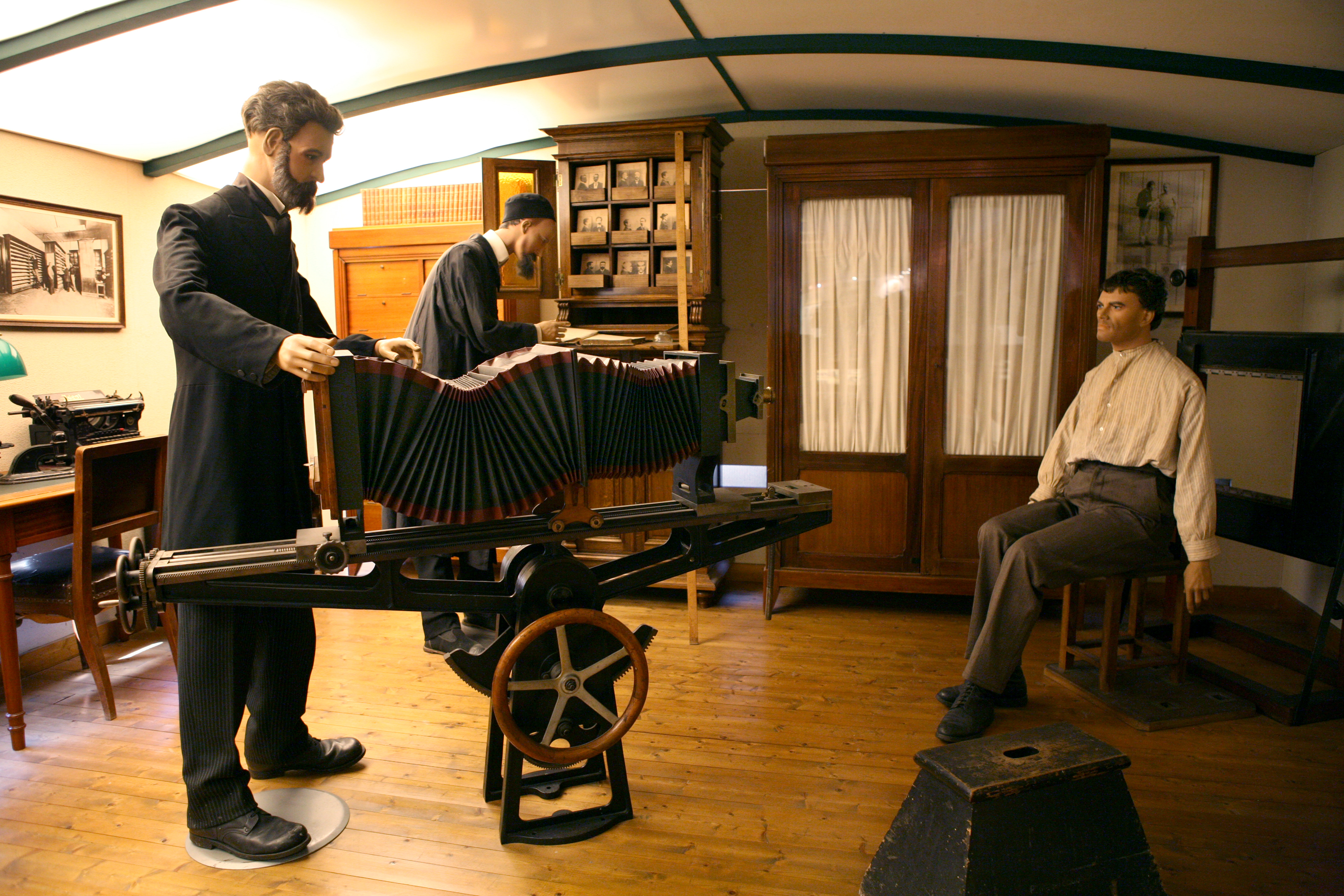 Musée de la Préfecture de Police, Paris. Salle consacrée à Alphonse Bertillon, qui a inventé une méthode de mesure, caractérisation, classification et photo des Délinquants dans la seconde moitié du 19e siècle